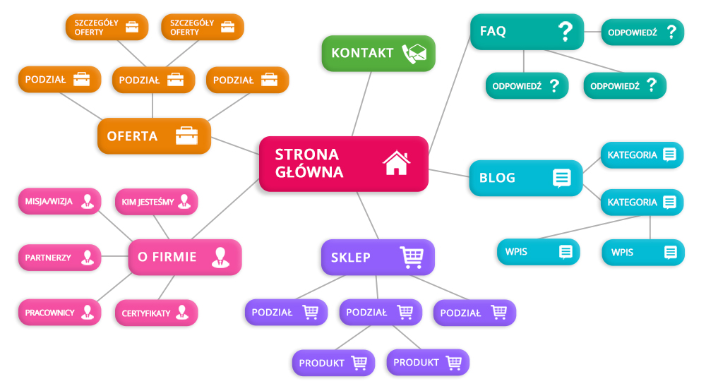 Przykładowa struktura niewielkiej strony. Struktura strony została przygotowana w oparciu o dobre praktyki optymalizacji.